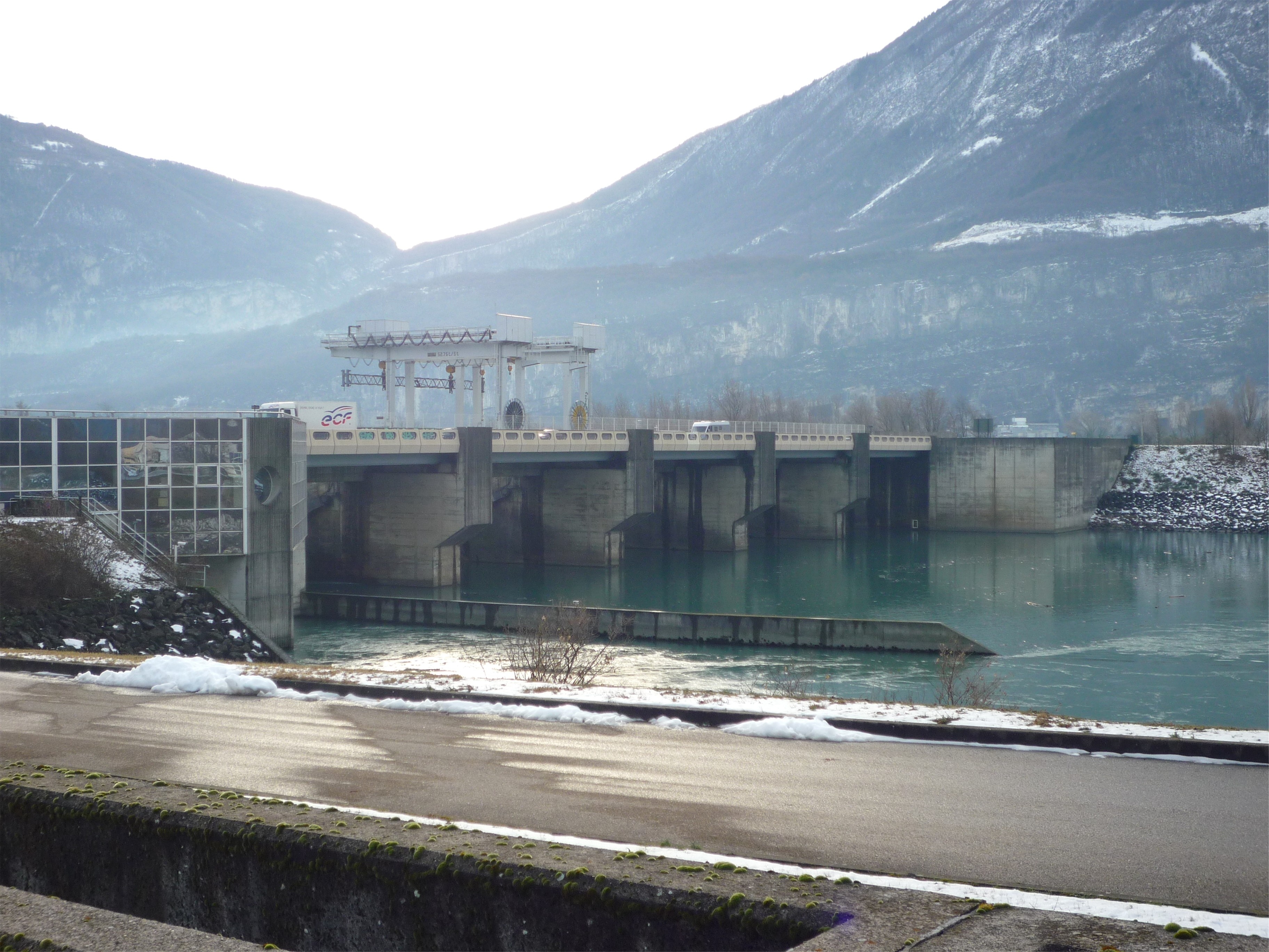 Pont barrage reliant Saint-Egrève à Noyarey, Mise en circulation automobile en décembre 2010.